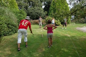 Playing kubb